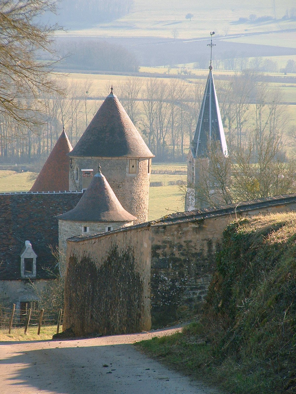 Thory (Yonne) : le château